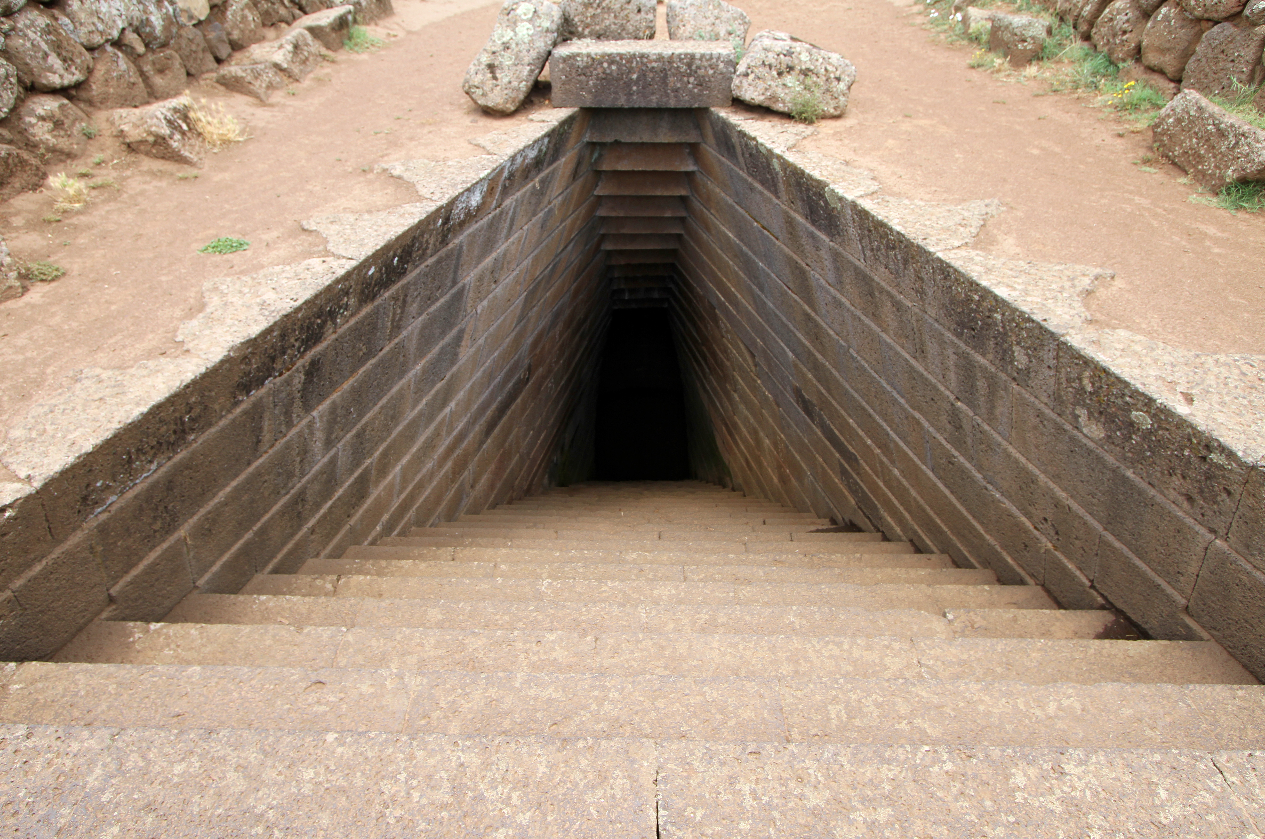 Pozzo sacro di Santa Cristina: l'ingresso.